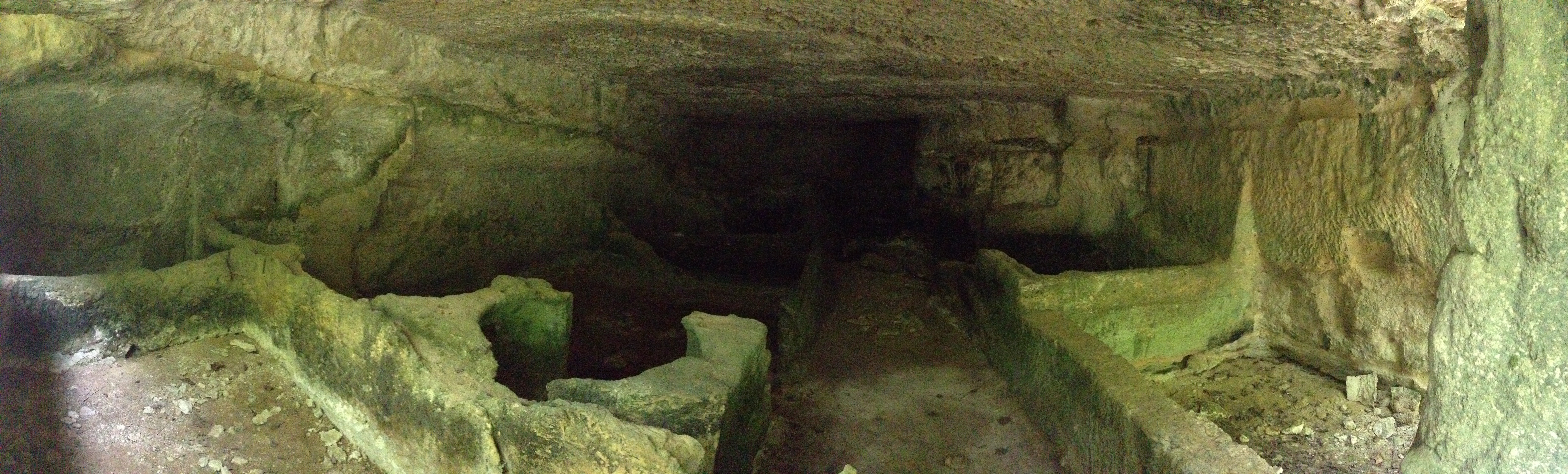 Interno conceria